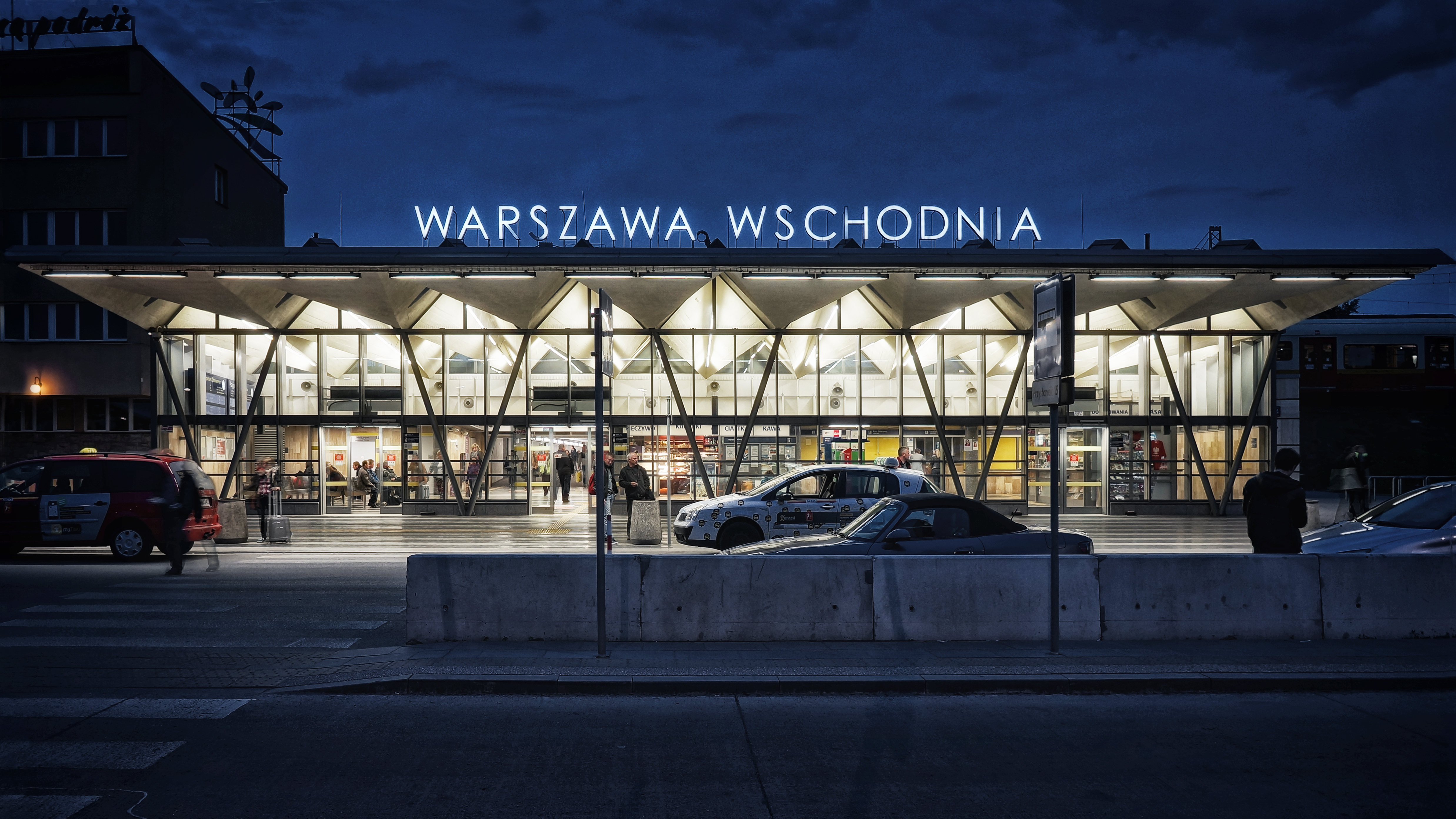 Warszawa Wschodnia widok od ul. Lubelskiej